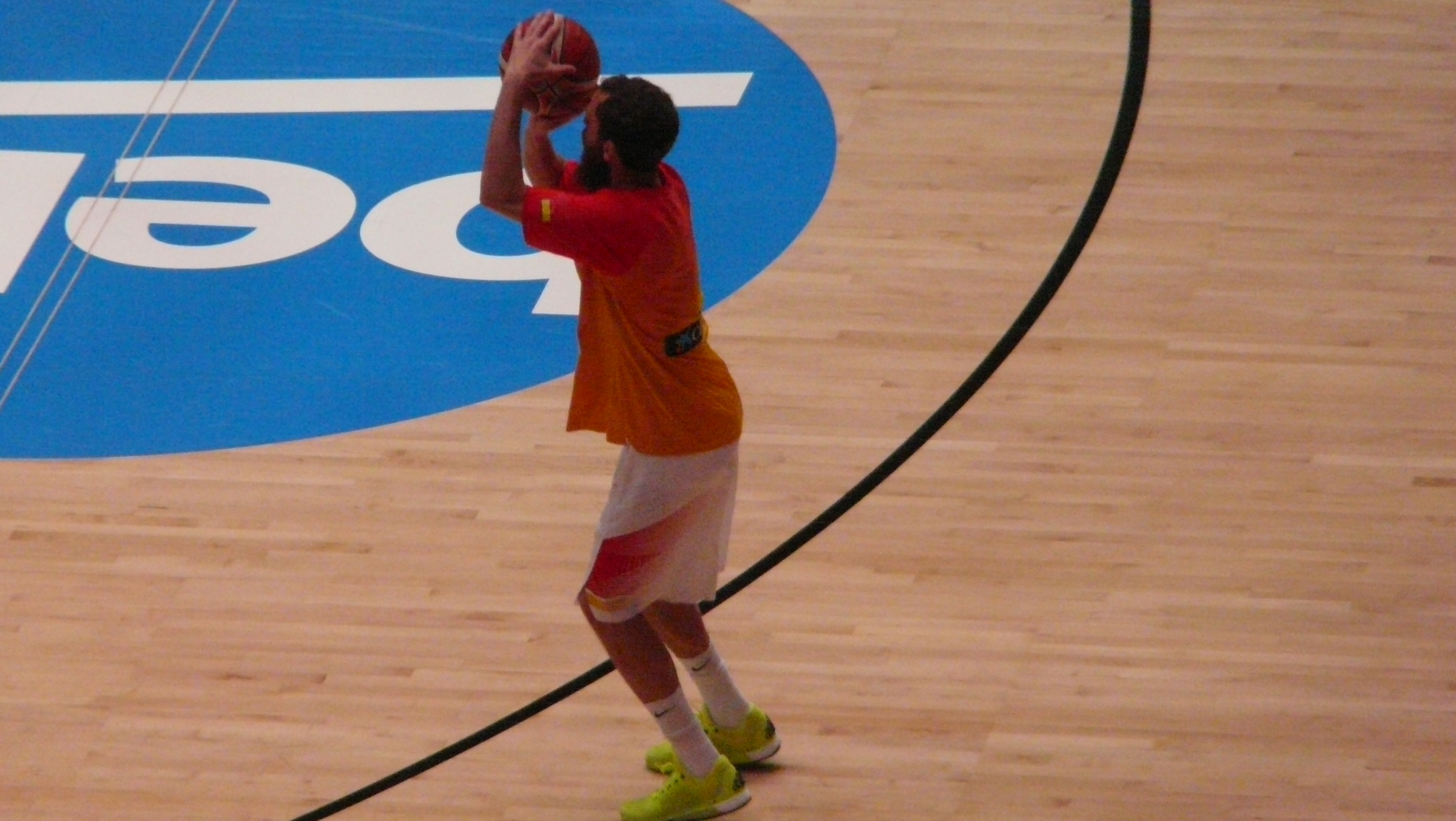 Sergio Rodríguez (#6) à l'échauffement lors du quart de finale de l'EuroBasket 2015 entre l'Espagne et la Grèce, le 15 septembre 2015.